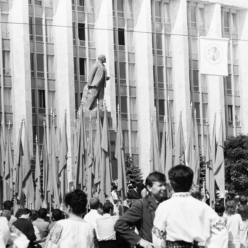 In Lionea (1980).